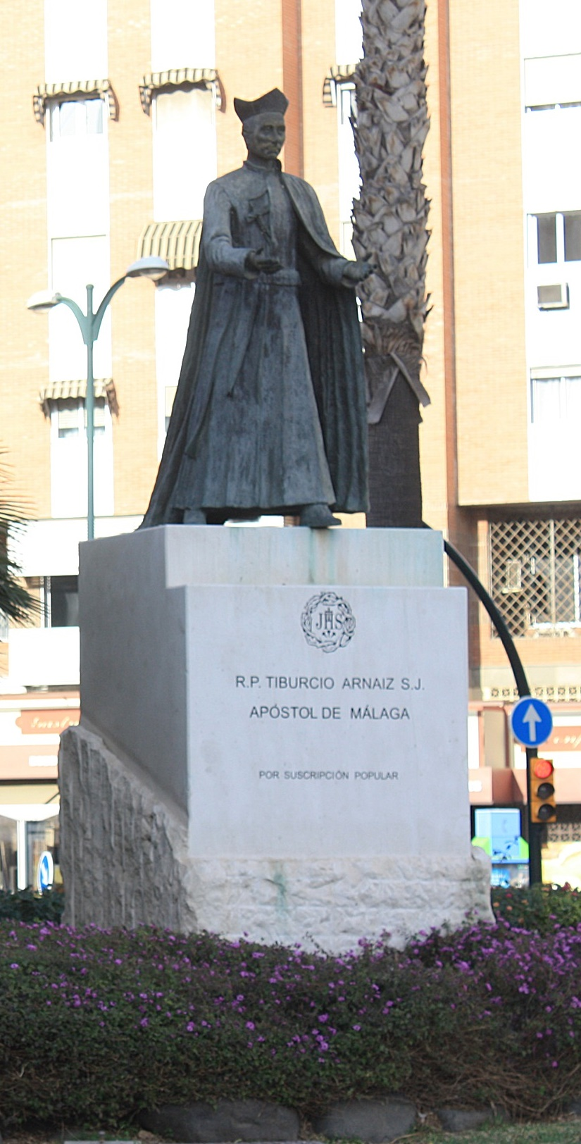 Monumento a Tiburcio Arnáiz. Málaga. Andalucía. España.